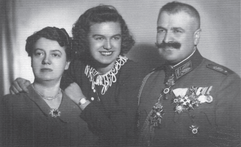 генерал-майор Стефанов със семейството си, Русе, 1940 г.